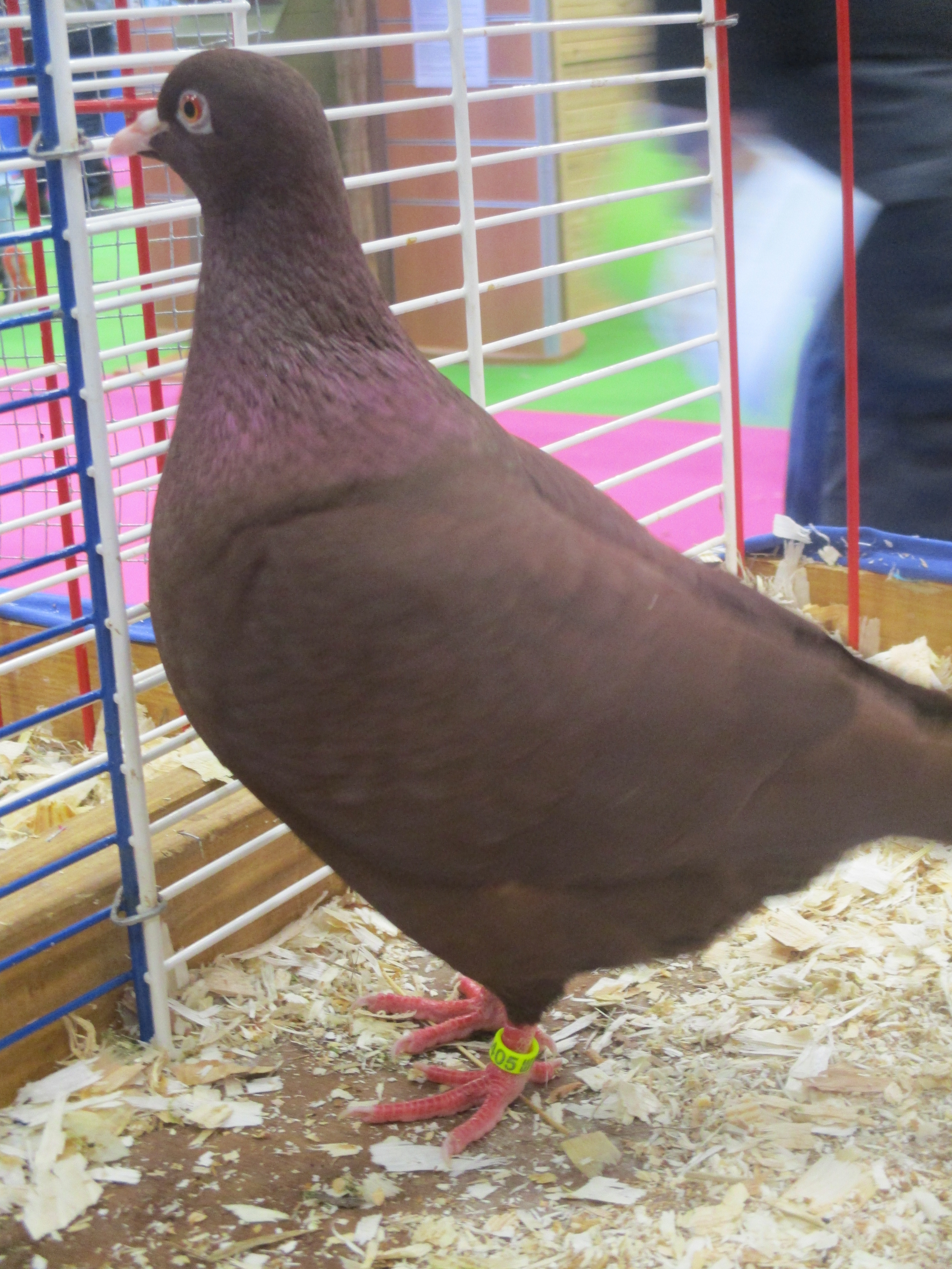 Pigeon carneau rouge au salon de l'agriculture de février 2018.